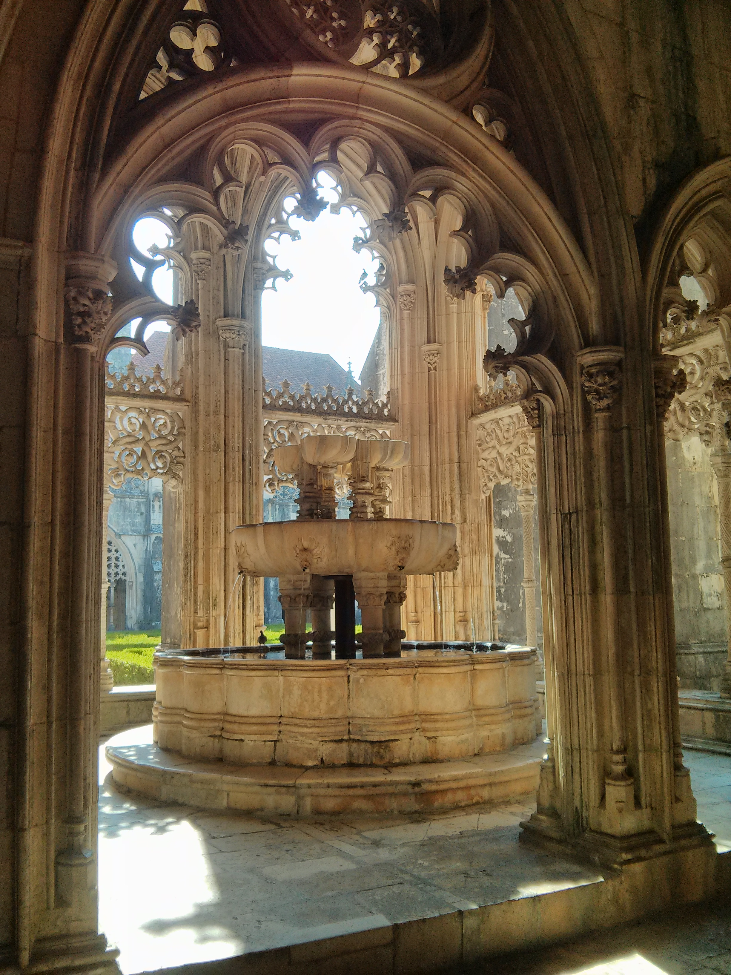 Batalha